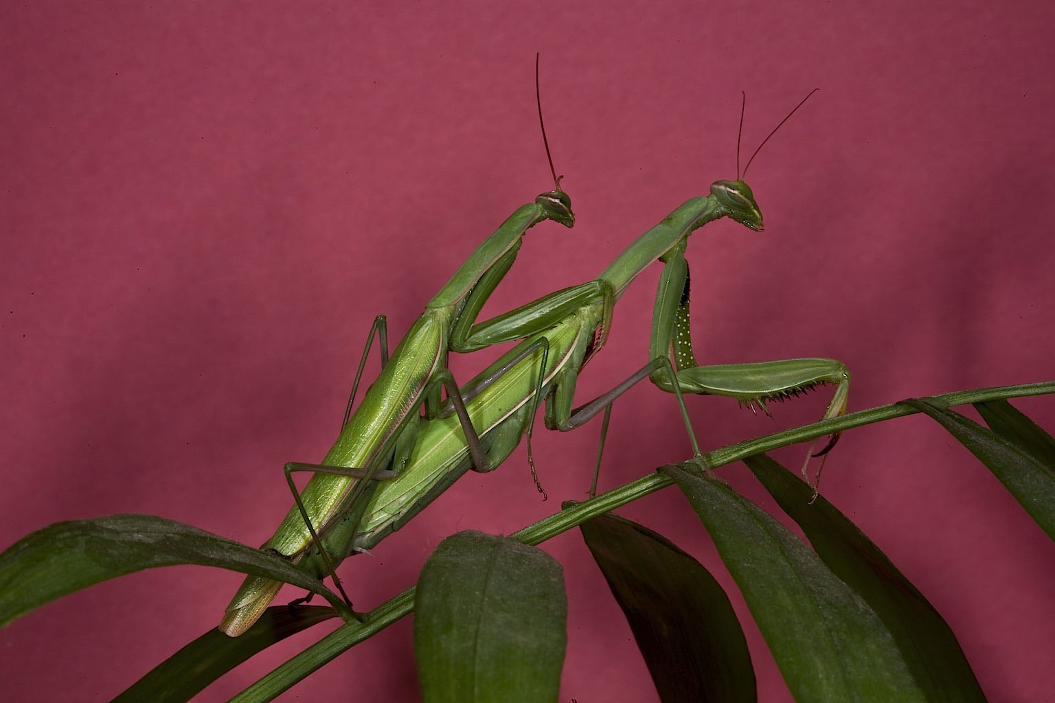 Praying Mantis Mating